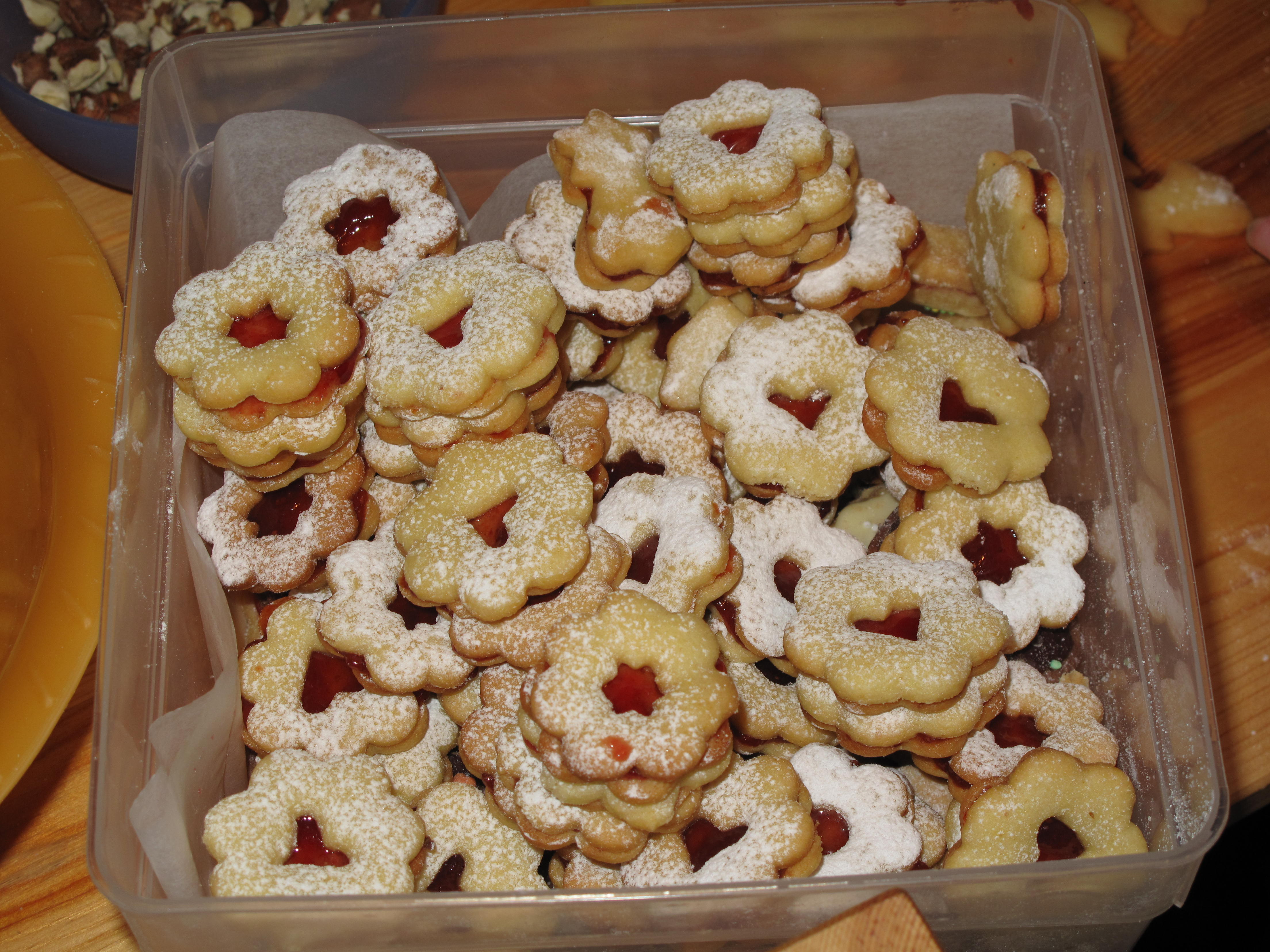 Cukroví z lineckého těsta